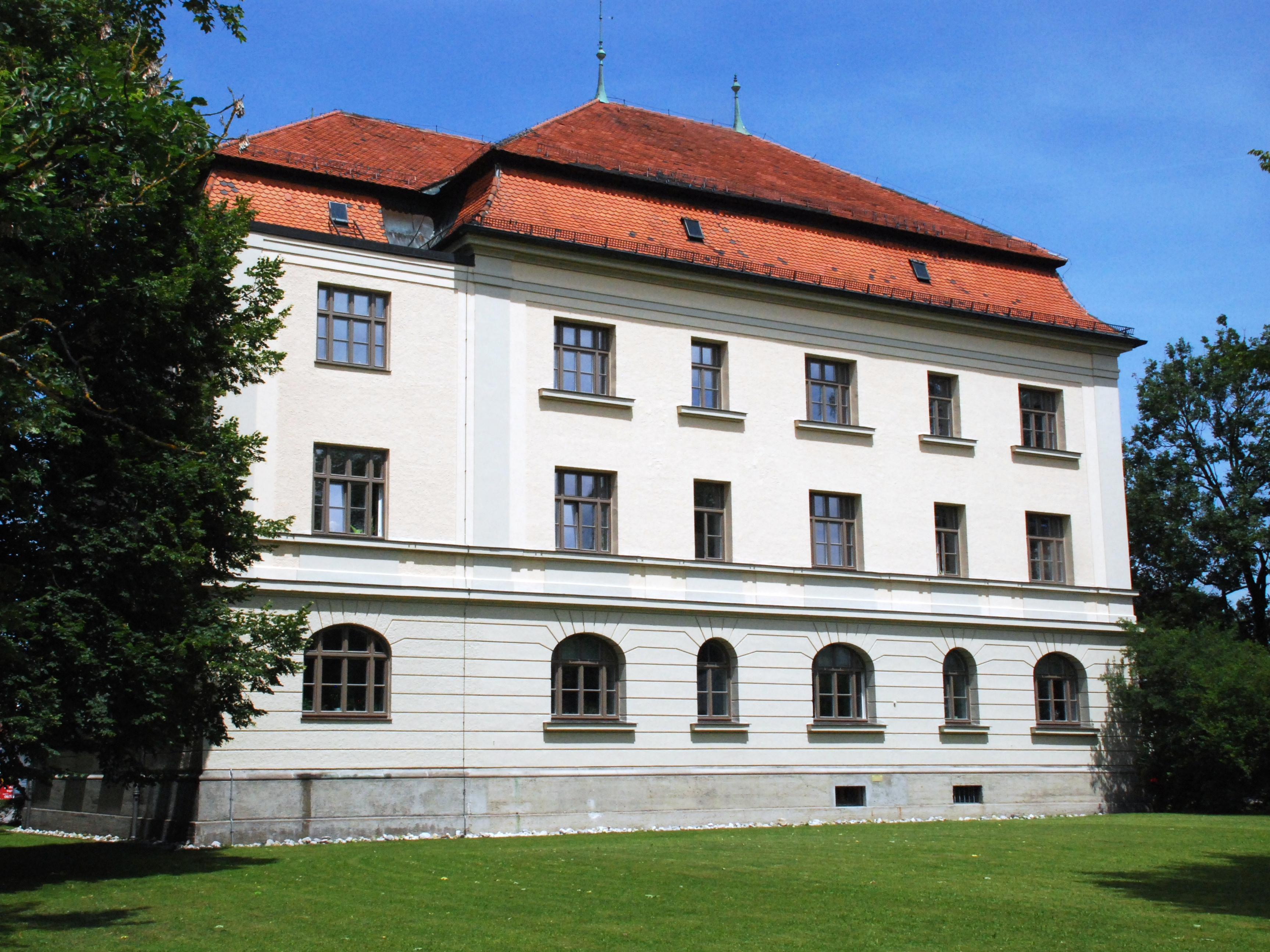 Amtsgericht Miesbach in der Rosenheimer Straße 16 in Miesbach, Landkreis Miesbach, Regierungsbezirk Oberbayern, Bayern. Als Baudenkmal unter Aktennummer D-1-82-125-45 in der Bayerischen Denkmalliste aufgeführt. Laut Denkmalliste als königlich bayerisches Bezirksgericht wohl im Jahr 1901 erbaut.